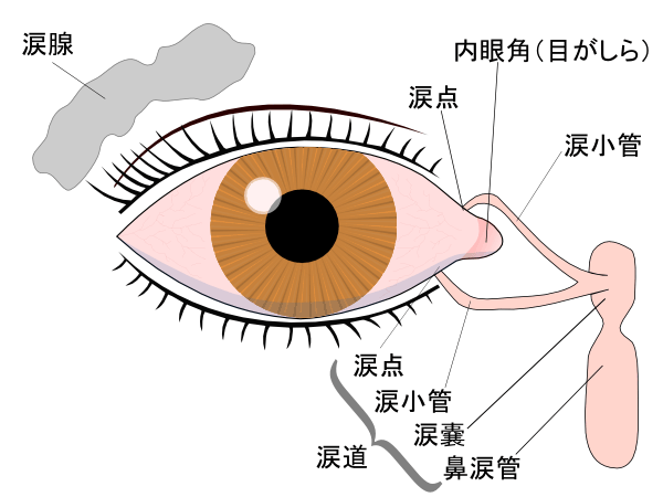 涙腺と涙道の概念図。svgファイルだと、なぜか日本語部分がちゃんと表示されません。（画像ファイルのデータは問題ないと思うので、サーバーに何らかの問題があるようです）そのためこのpng形式のバージョンをアップロードしてあります。